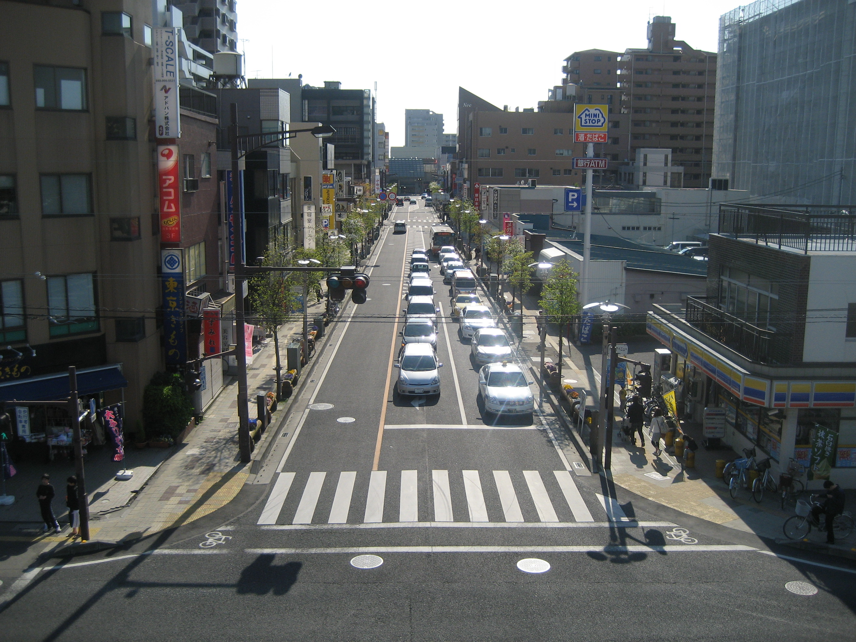 埼玉県道403号線松原団地入口交差点付近